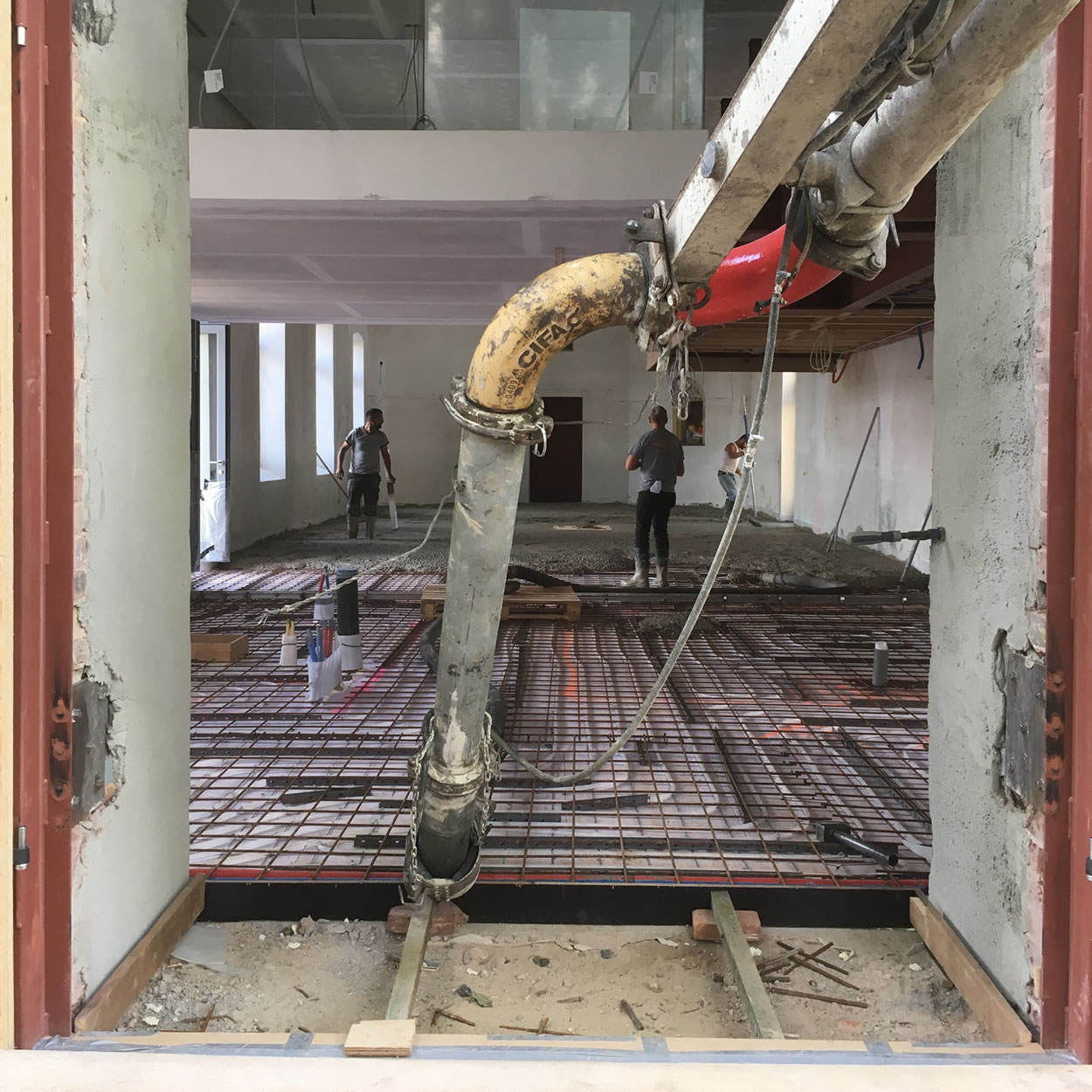 Het storten van de vloer in de Andrieskapel